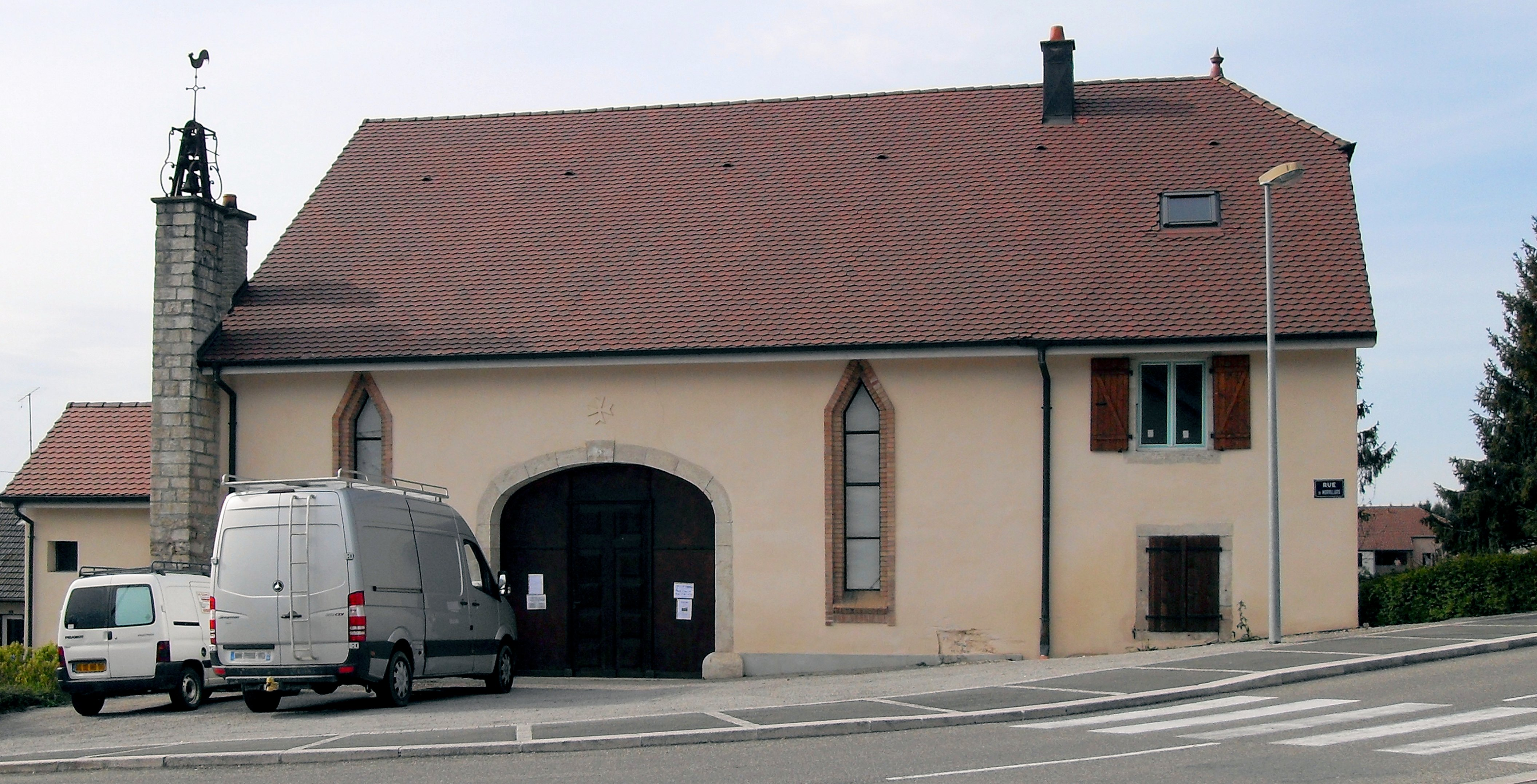 La chapelle Saint-Étienne à Méziré